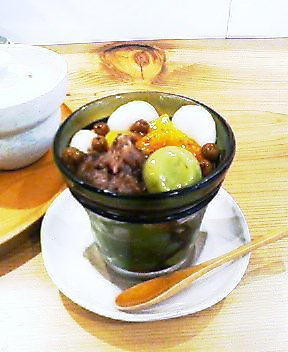 白玉あんみつ.